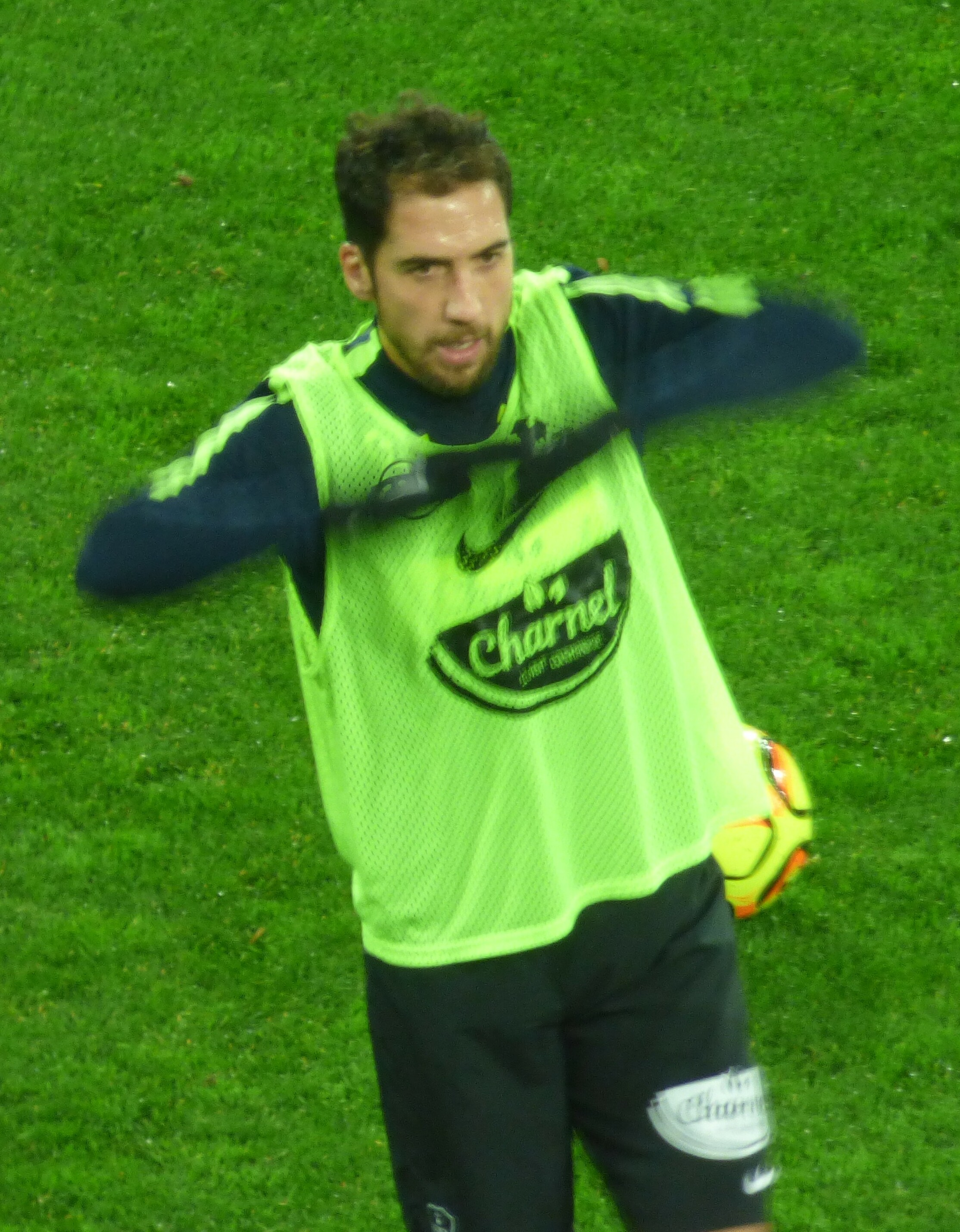 Thomas Ayasse avant le match RC Lens / Stade brestois, le 4 décembre 2018, comptant pour la dix-septième journée du championnat de France de football de Ligue 2 2018-2019, au Stade Bollaert-Delelis.